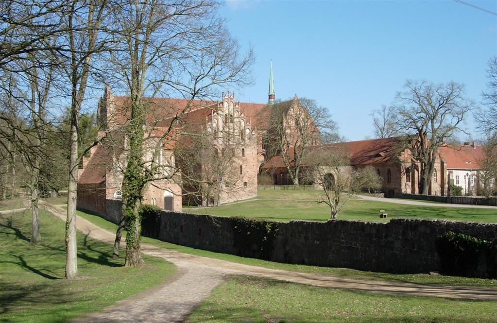 Kloster Chorin - gesamtansicht.